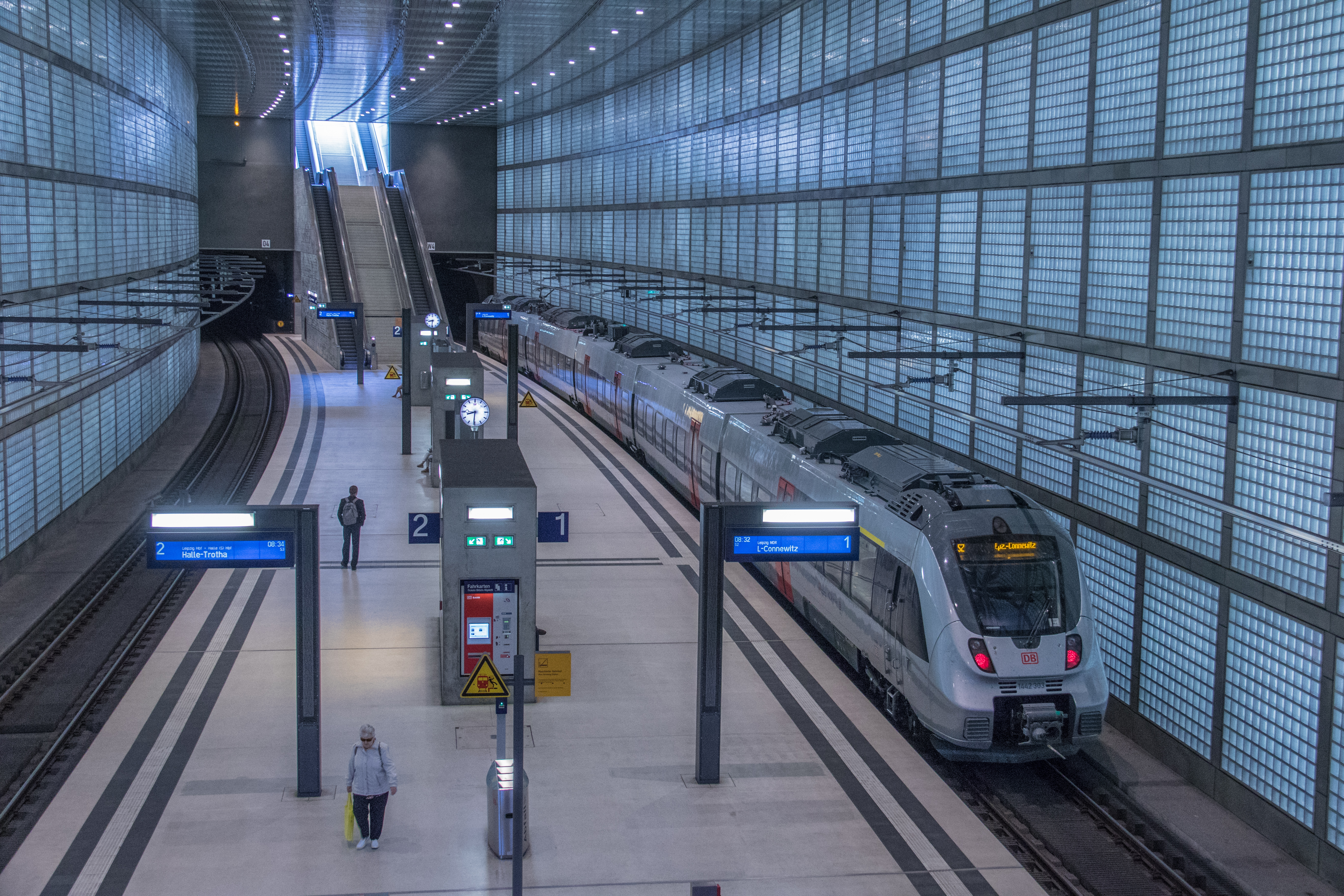 Talent 2, erster Einsatz für S-Bahn Mitteldeutschland II auf der S2 - Station Leipzig Wilhelm-Leuschner-Platz